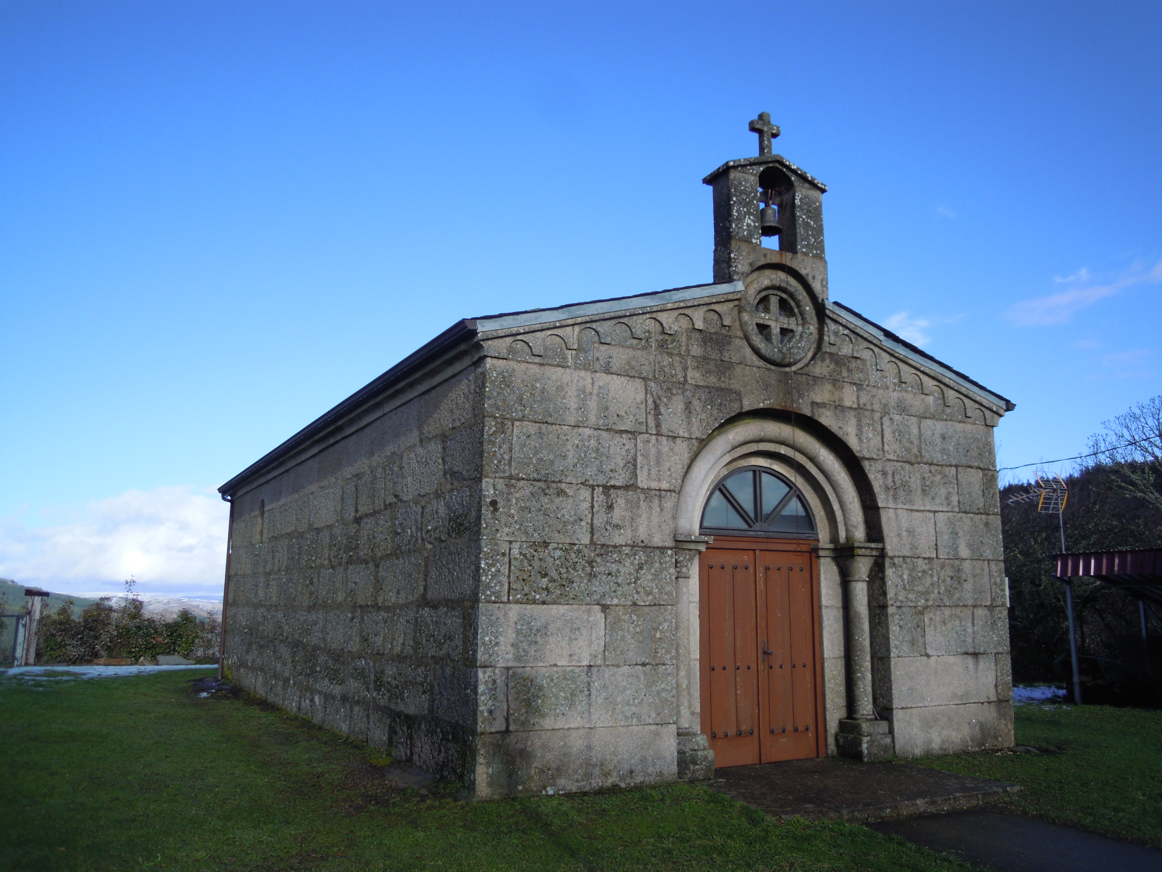 Capela de San Amaro nas Vendas da Barreira (Riós).